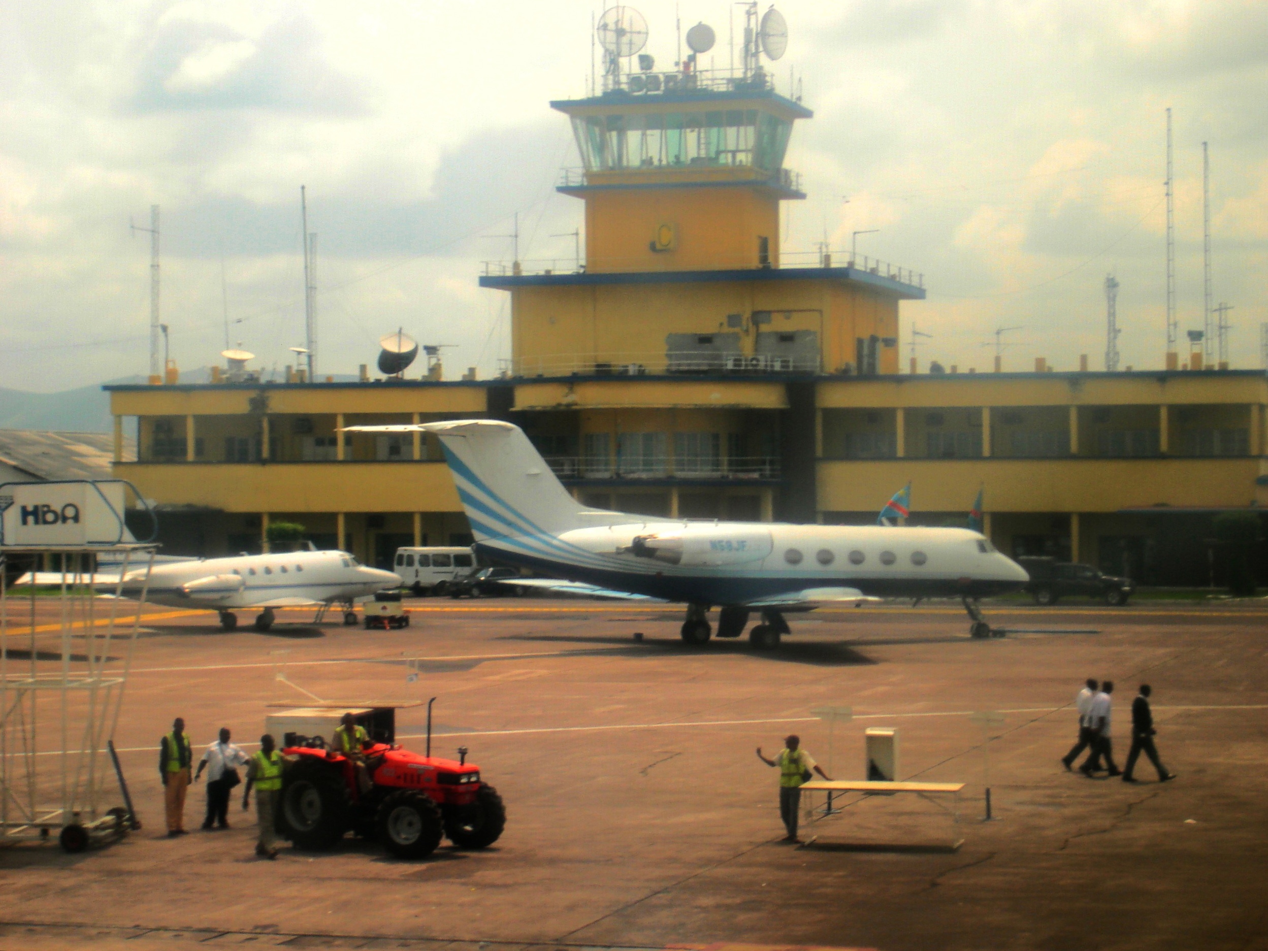 Aéroport de Kinshasa 2, le point de contact entre Kinshasa et le reste du monde.